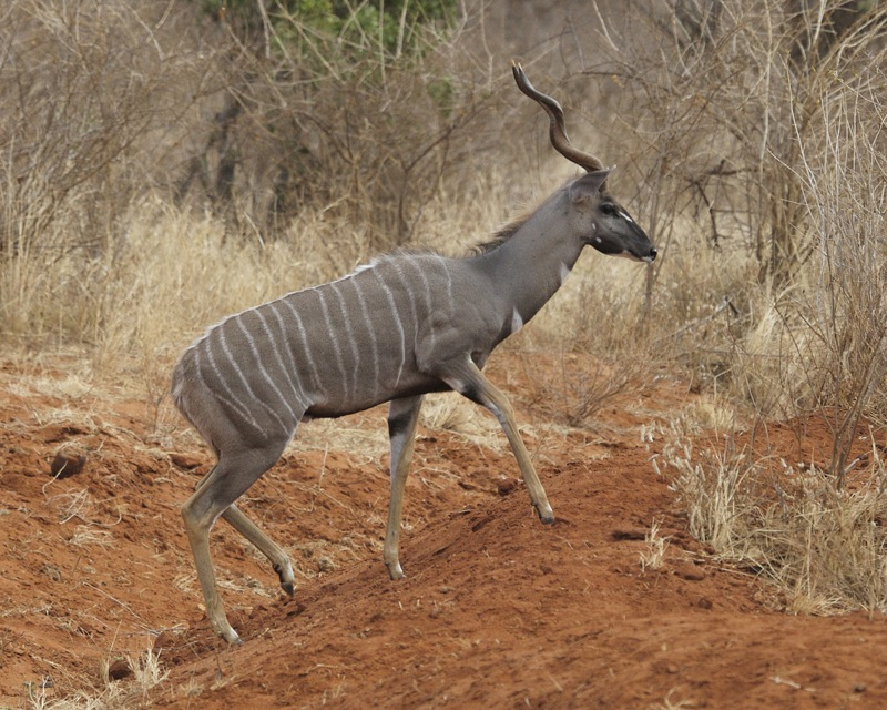 Lesser Kudu Tragelaphus imberbis Tsavo, Kenya August, 2008 690V0256